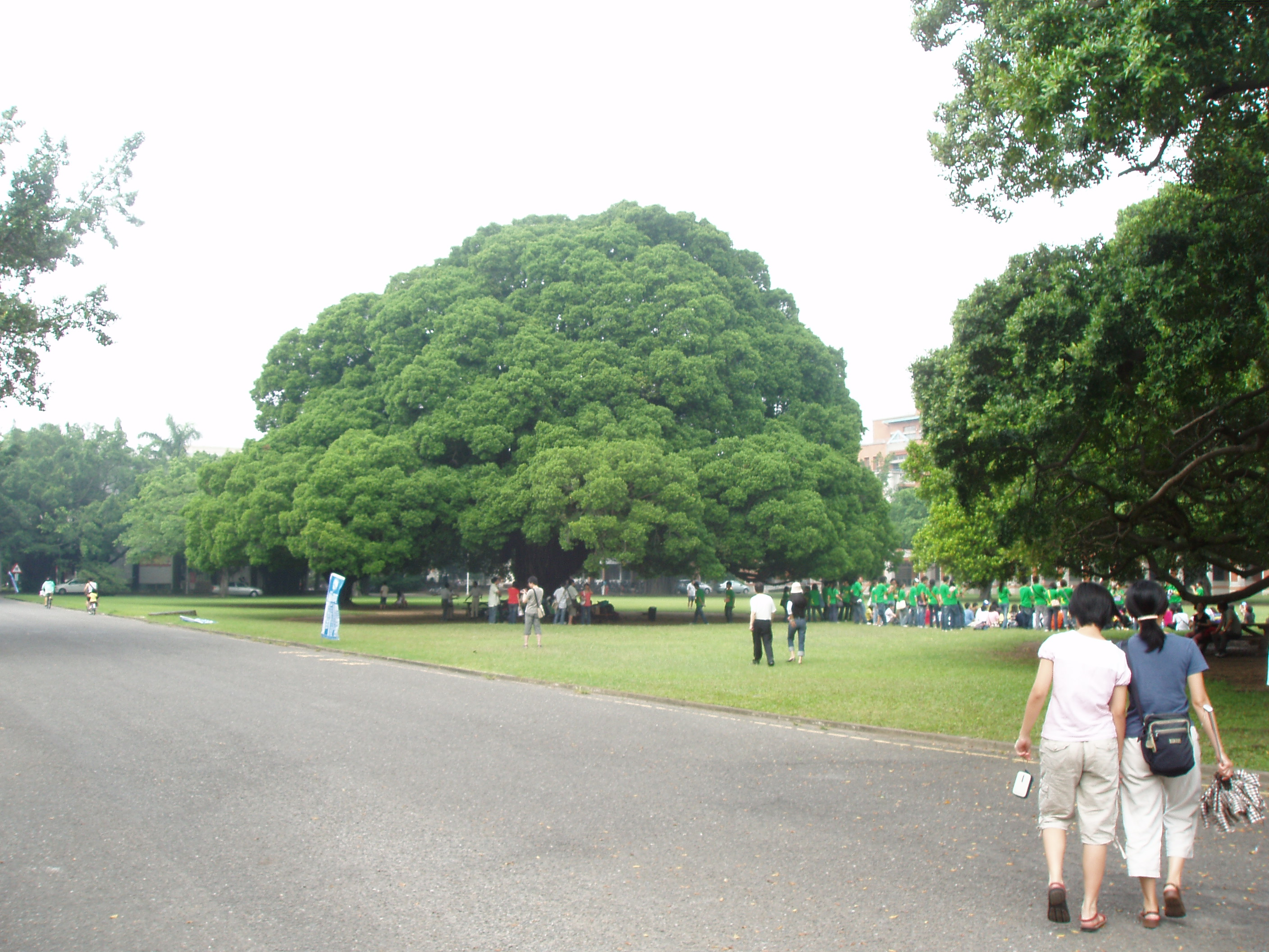 成功大學校園內榕樹。